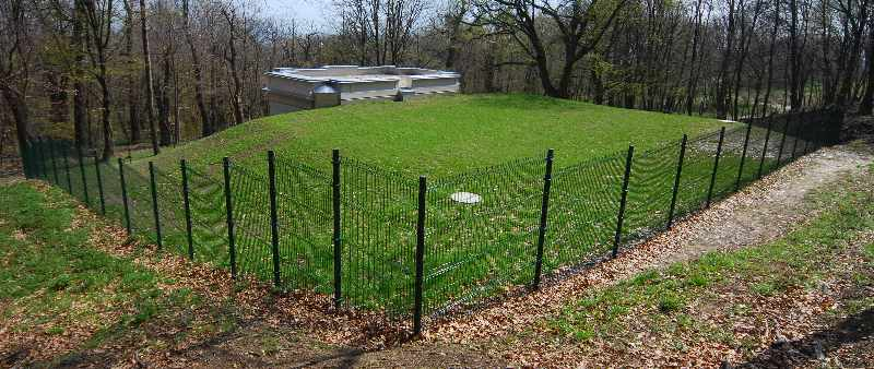 Der Wasserbehälter Cobenzl im 19. Wiener Gemeindebezirk Döbling, Oberfläche